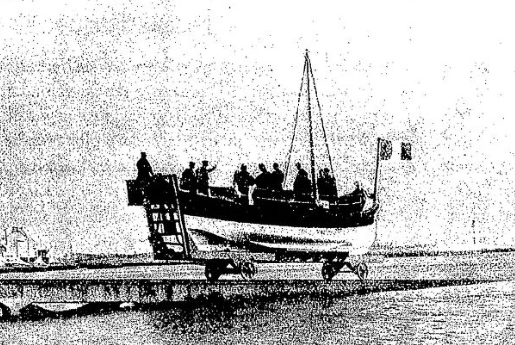 Guilvinec : le canot de sauvetage Vice-Amiral Charles Duperré le jour de son inauguration le 21 octobre 1927